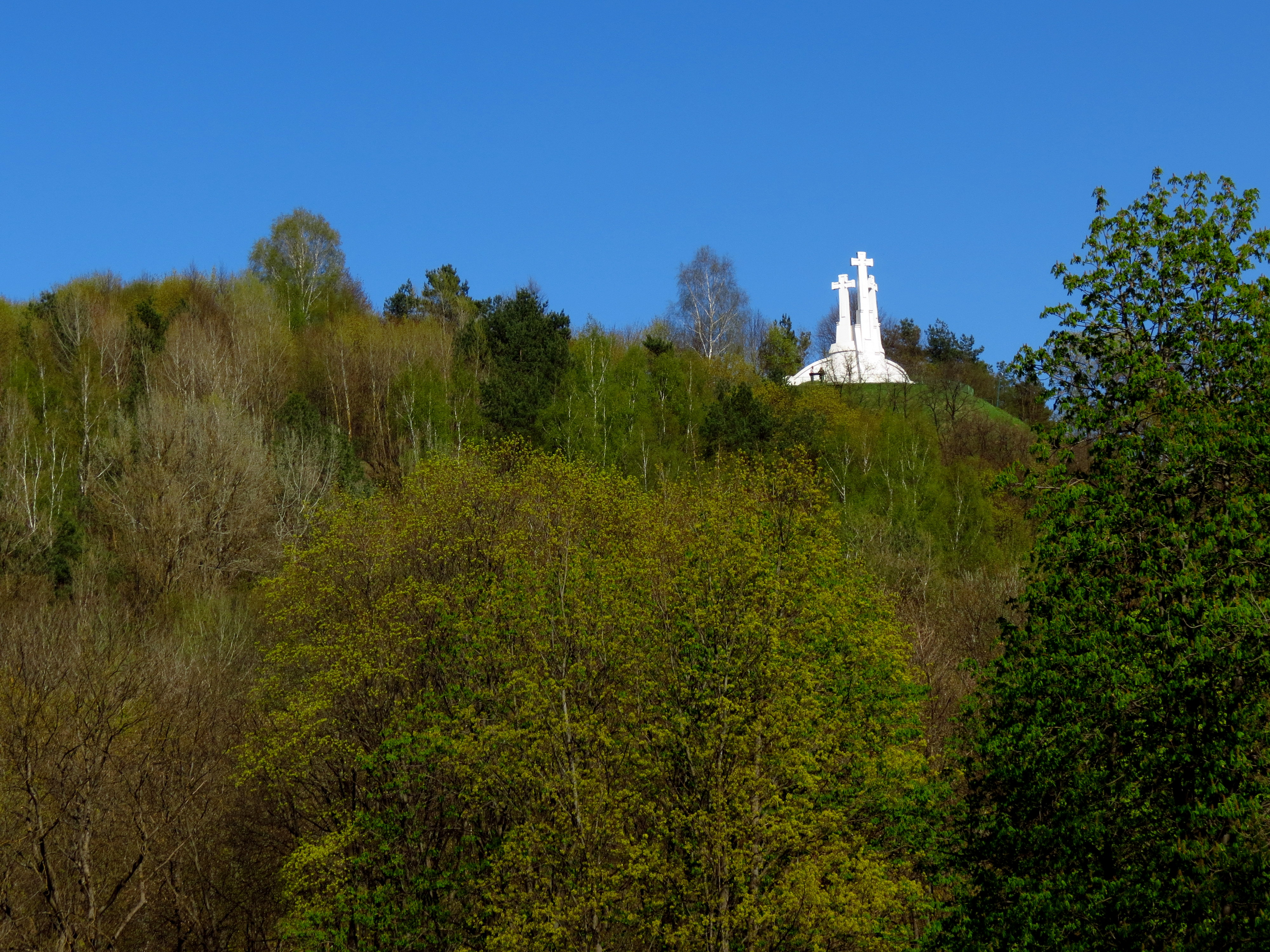 Vue de Vilnius.